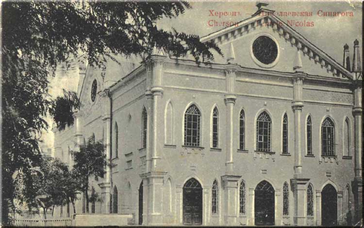 Миколаївська синагога. Херсон